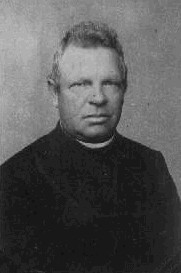 Jan Ladislav Duben (1829 - 1910), Český a rakouský římskokatolický kněz a politik.